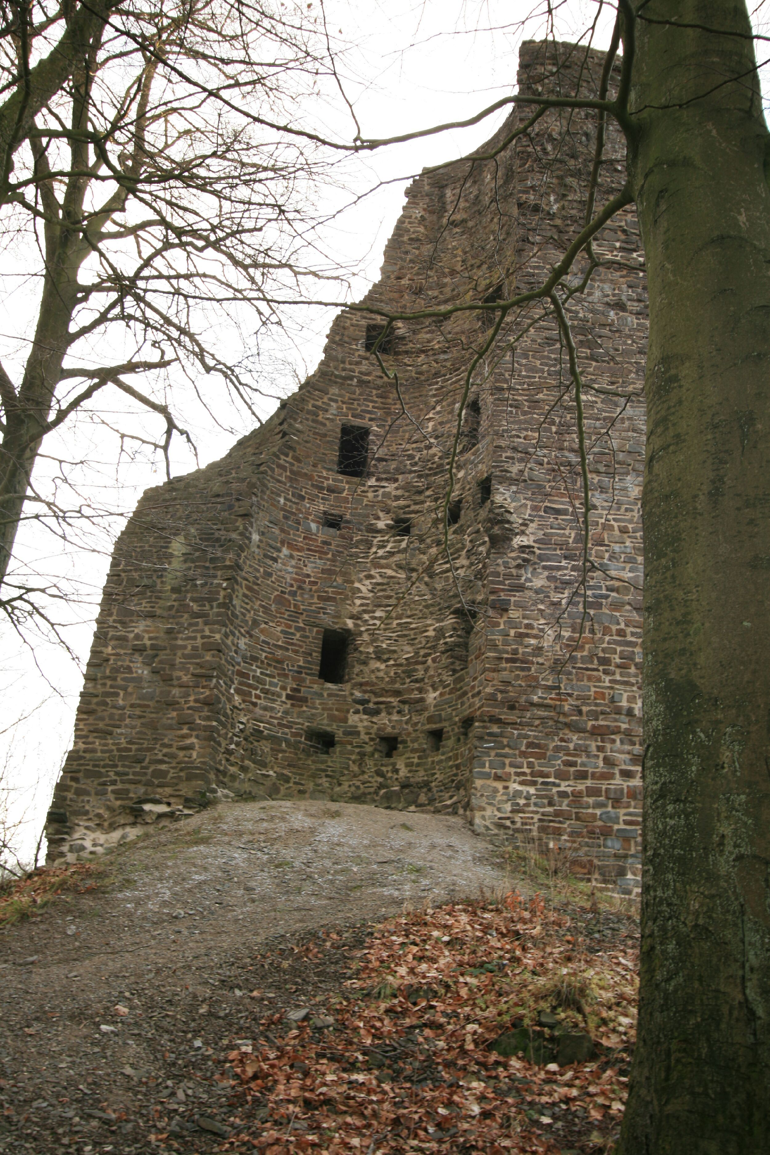 Burg Waldenburg (Attendorn) Blick nach Süd-Westen, Große Turm